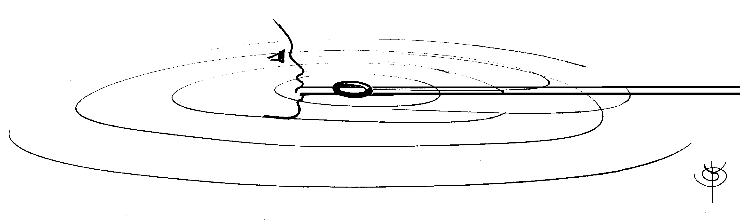 Perception kinesthésique-optique du « Phi » dans la pratique du Sarbacana.